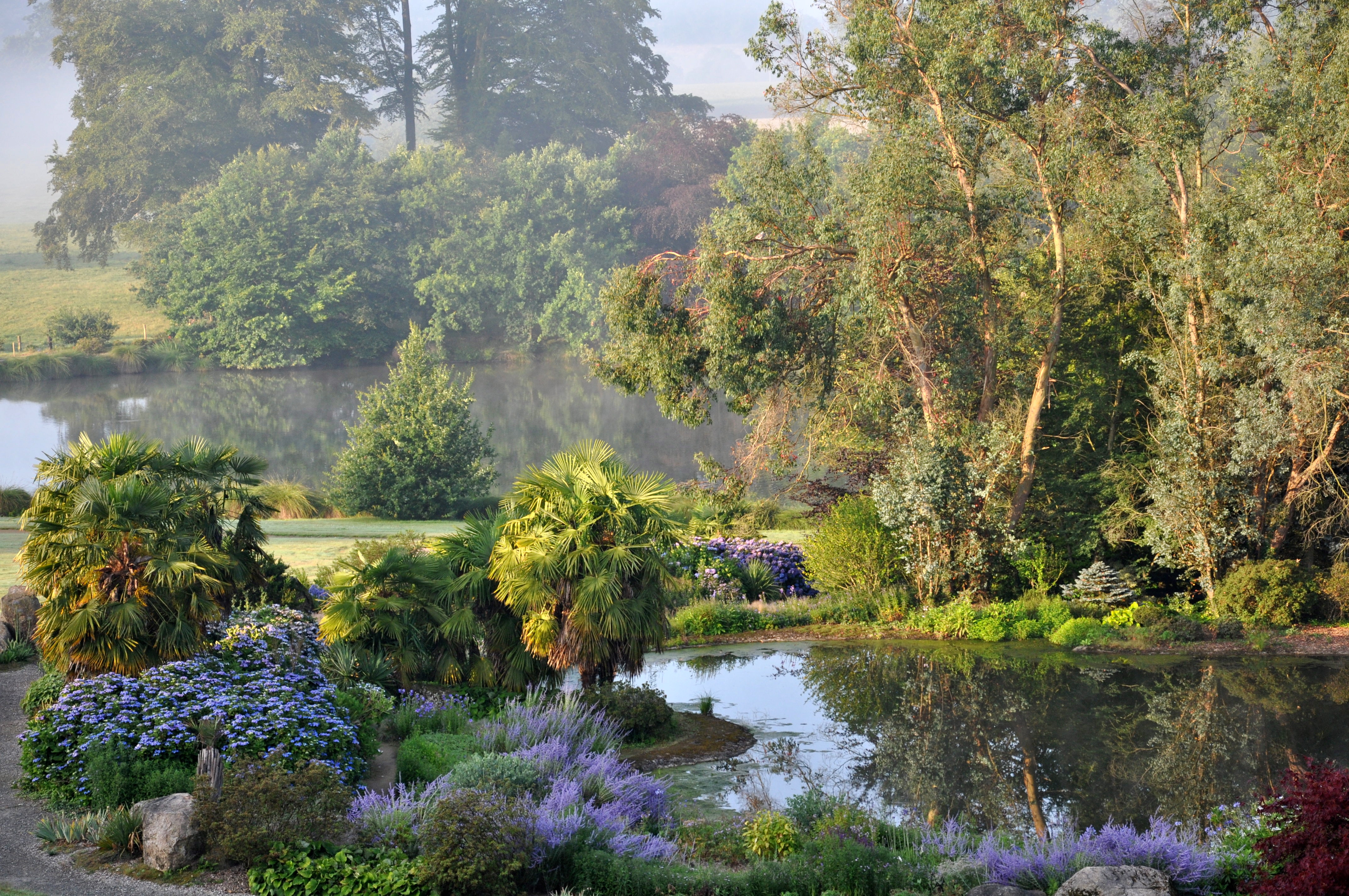 au Parc Botanique de Haute Bretagne